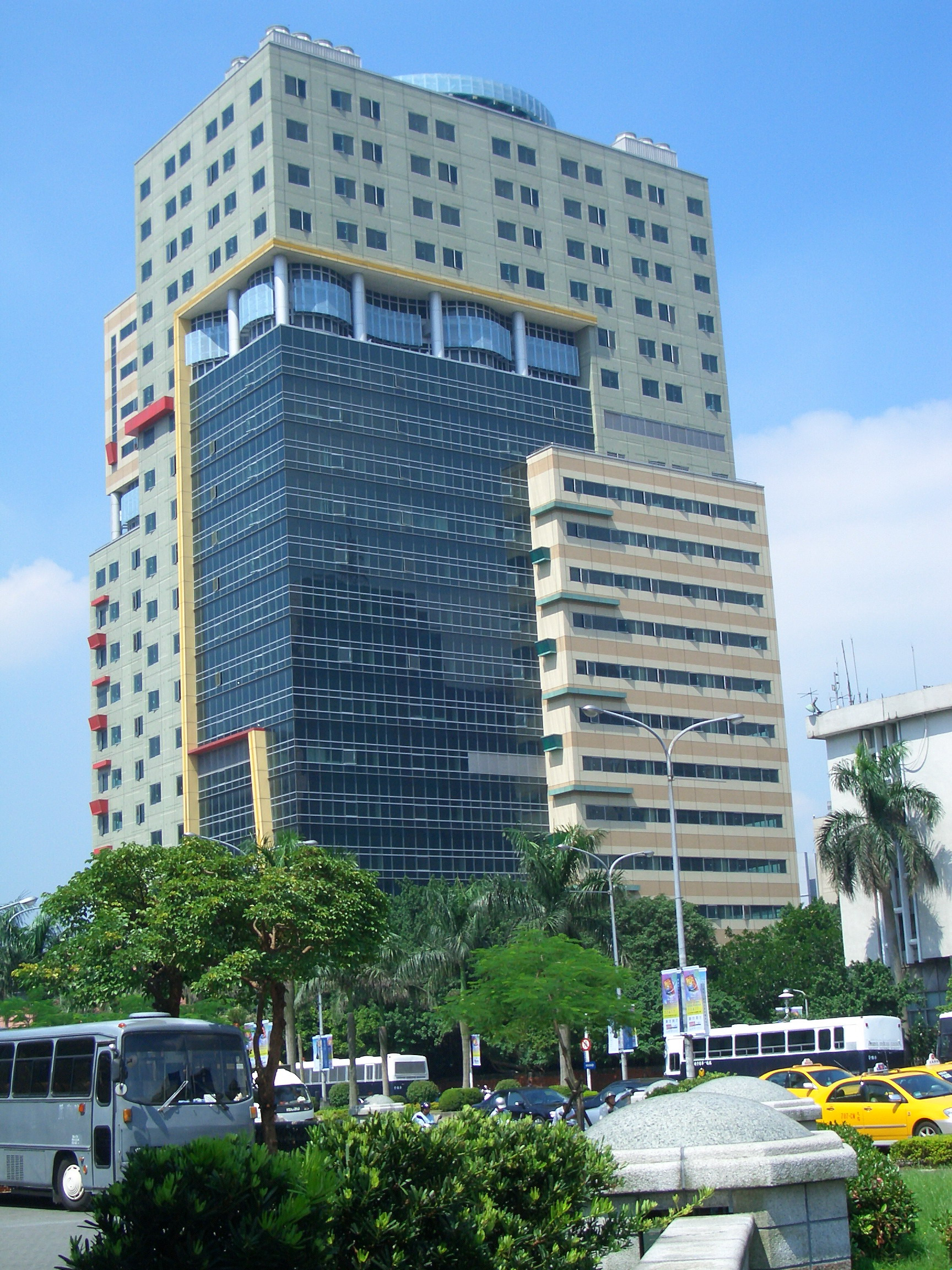 國立臺灣大學醫學院附設醫院兒童醫療大樓。